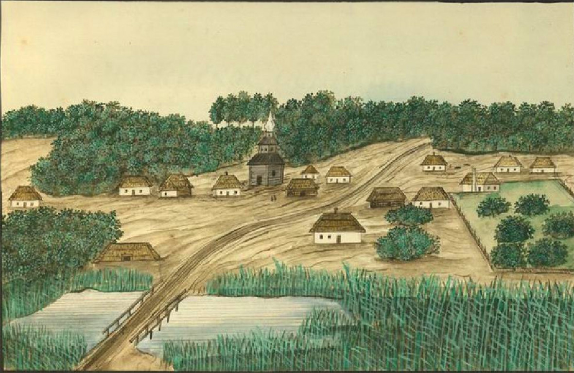 Мостище. Домінік П'єр де ля Фліз. «Медико-топографічний опис... Київської округи...». Київ, 1854. - с. 800